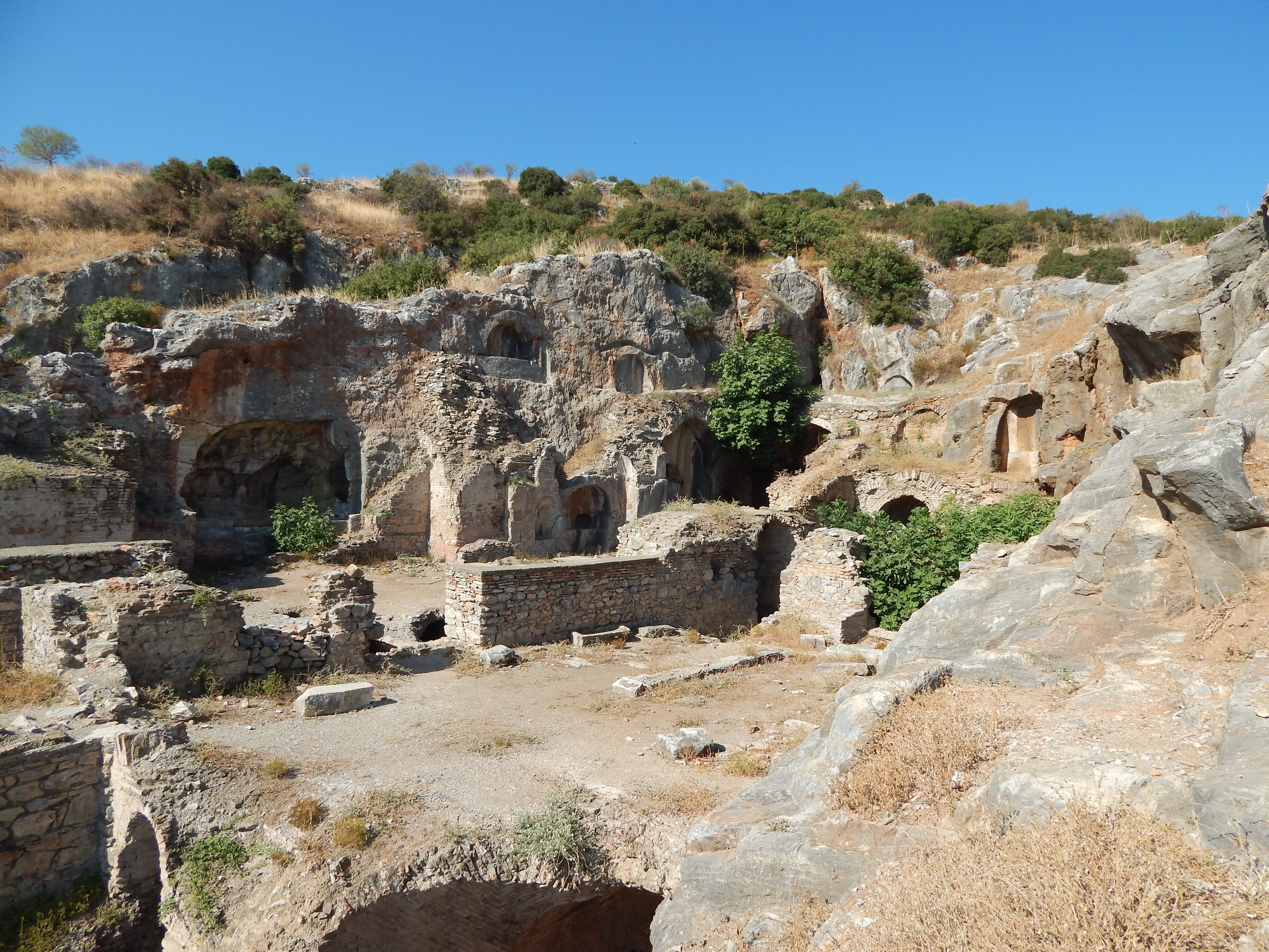 Yukarıdan Yedi Uyuyanlar...